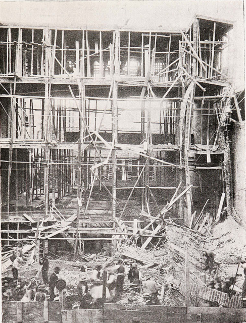 Vista de la destrucción generada por el derrumbe de la construcción de la ampliación de la Casa Pra, ocurrido el 10 de octubre de 1904.